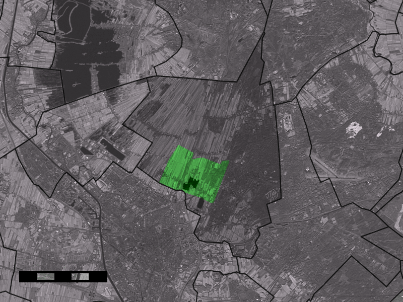 Map of Groenekan, municipality of De Bilt, the Netherlands. Image by User:Eugene van der Pijll. Boundaries municipalities and neighbourhoods: © 2003, Centraal Bureau voor de Statistiek/Topografische Dienst Kadaster Boundary village: © 2005, Centraal Bureau voor de Statistiek